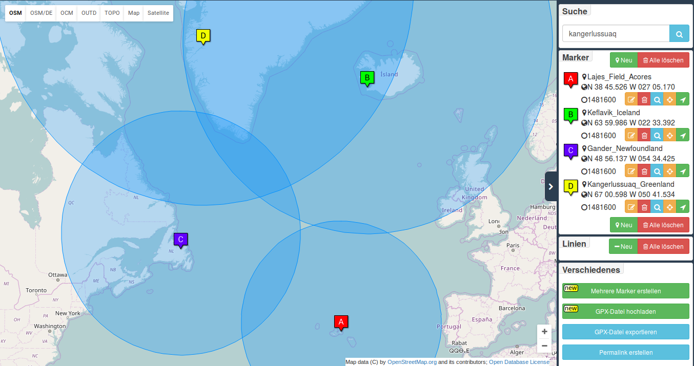 Grafische Darstellung der ETOPS-120-Radien um Keflavík (IS), Kangerlussuaq (DK), Lajes/Terceira (PT) und Gander (CA).